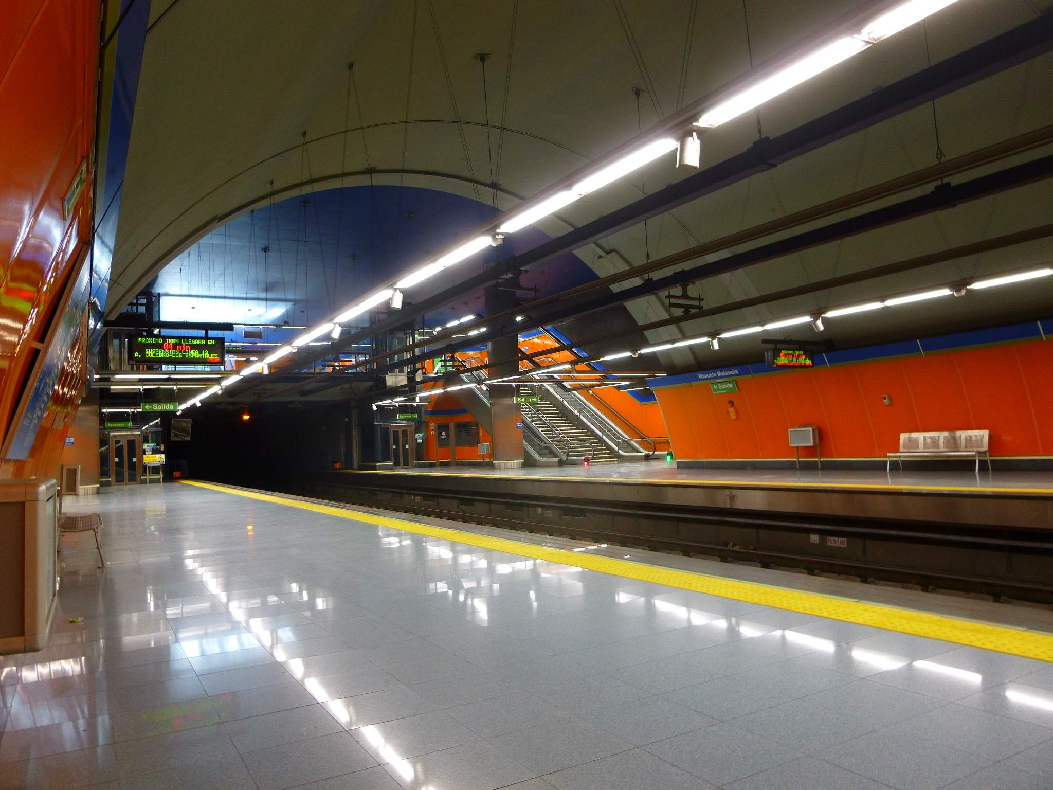 Estación de Manuela Malasaña de Metro Madrid, en Móstoles